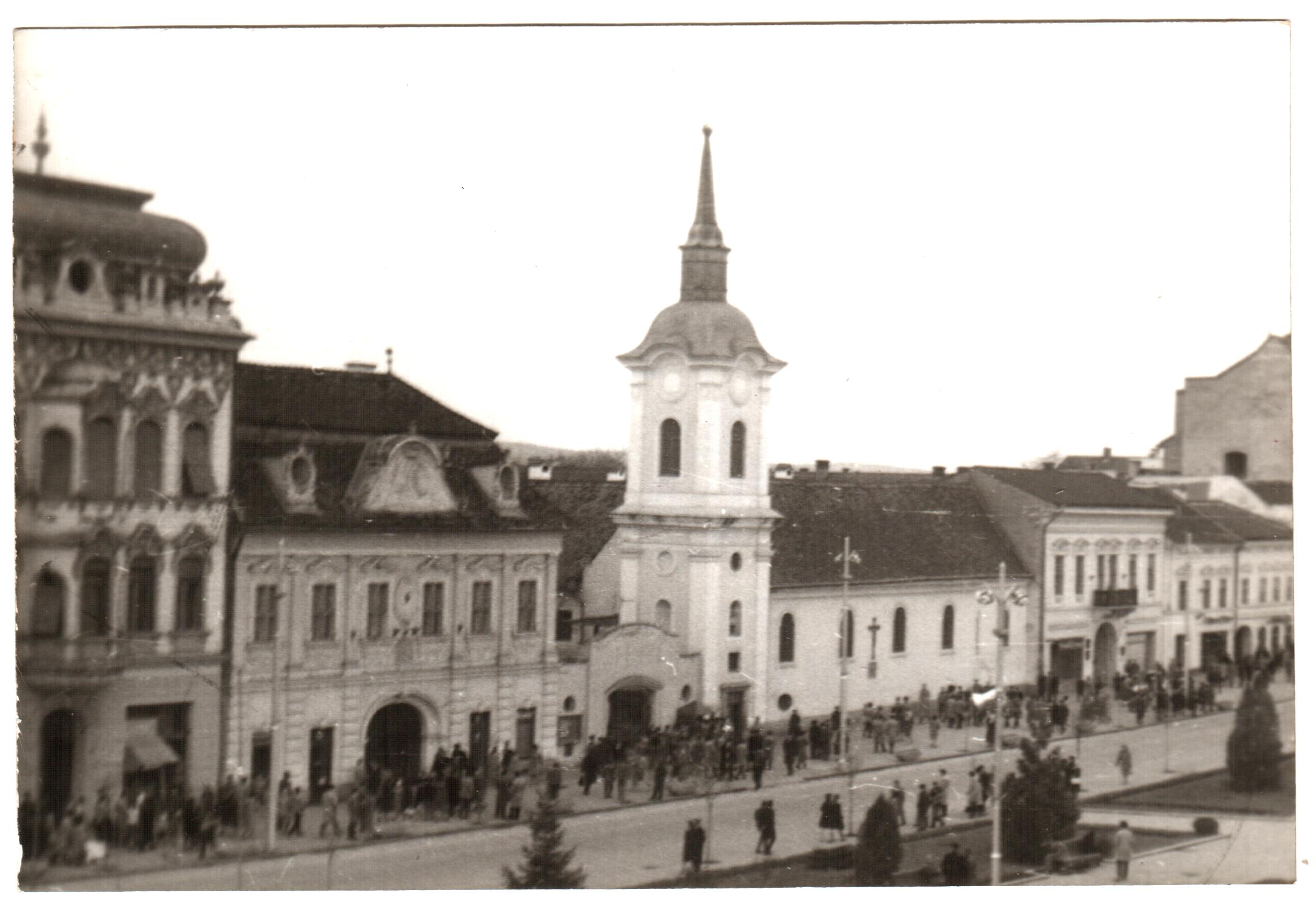 A felvétel az 1950 -es évek elején készült. Marosvásárhely főtere. A felvétel megjelent Creative Commons alatt a Metapolisz DVD sorozatban.